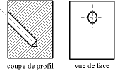 Ellipse servant à représenter un perçage oblique vu de face. La figure de gauche représente la vue en coupe de profil. La figure de droite représente la vue de face. Auteur : Christophe Dang Ngoc Chan, réalisé avec un programme de dessin vectoriel Licence GFDL Christophe Dang Ngoc Chan